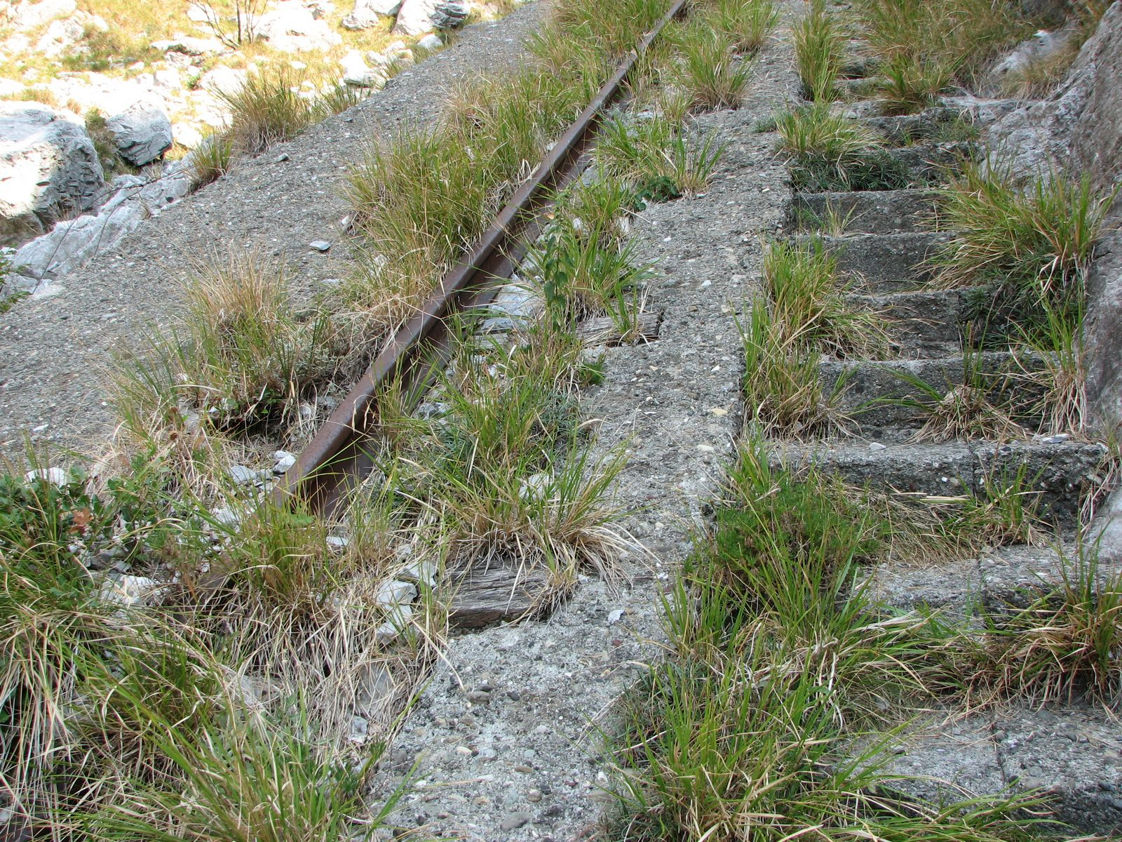 Particolare della lizza di Piastreta, Alpi Apuane - Italia.